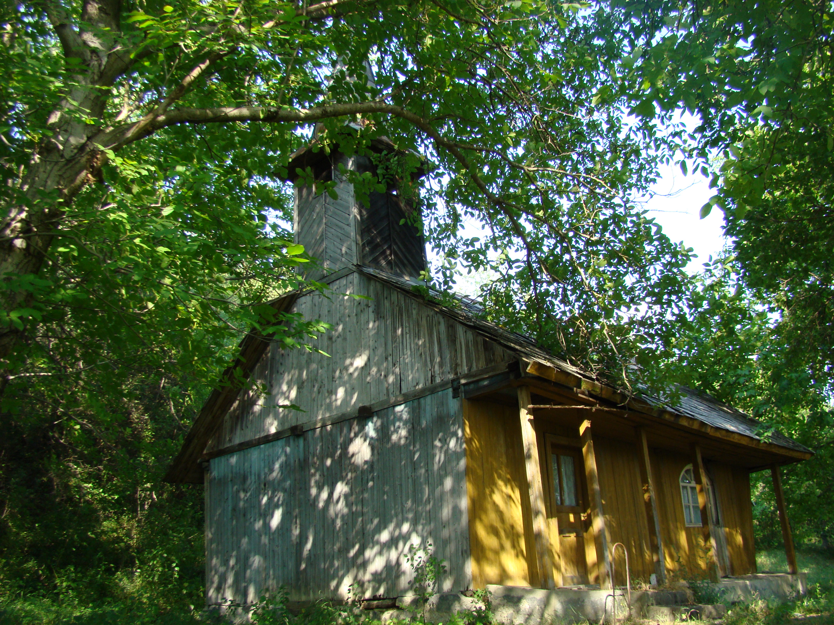 Biserica de lemn "Sf. Ioan Botezătorul" , sat COMLOD; comuna MILAŞ